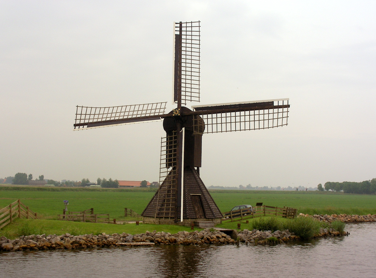 Dorismooltsje. Spinnenkopmolen bij Oudega. windmill in Friesland